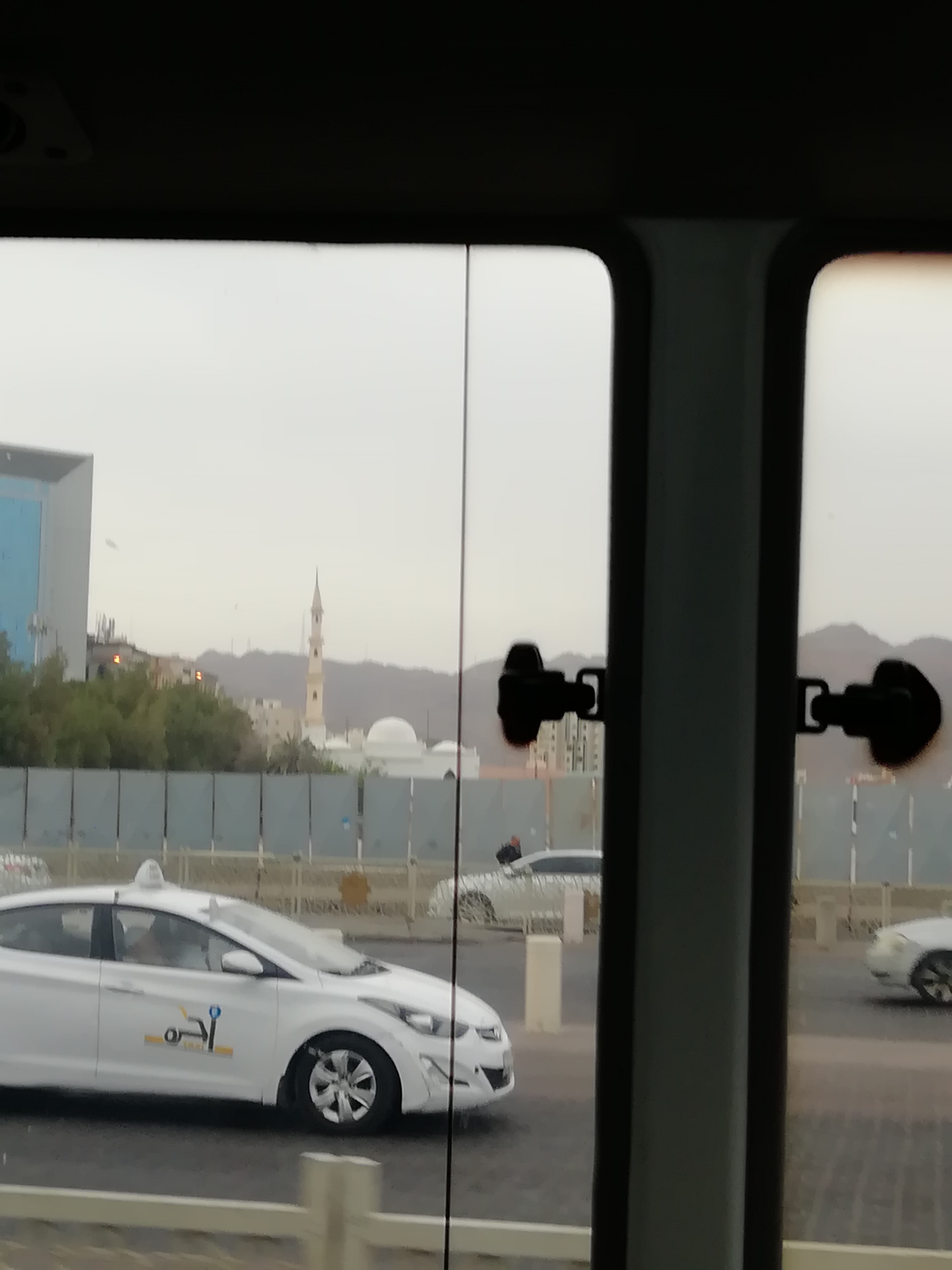 al-Madinah al-Munawarah Abu Dhar al-Ghafari street in Madina Abu Dhar al-Ghafari mosque (Sajda mosque)